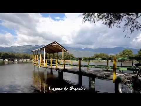 Incomparable belleza!!!